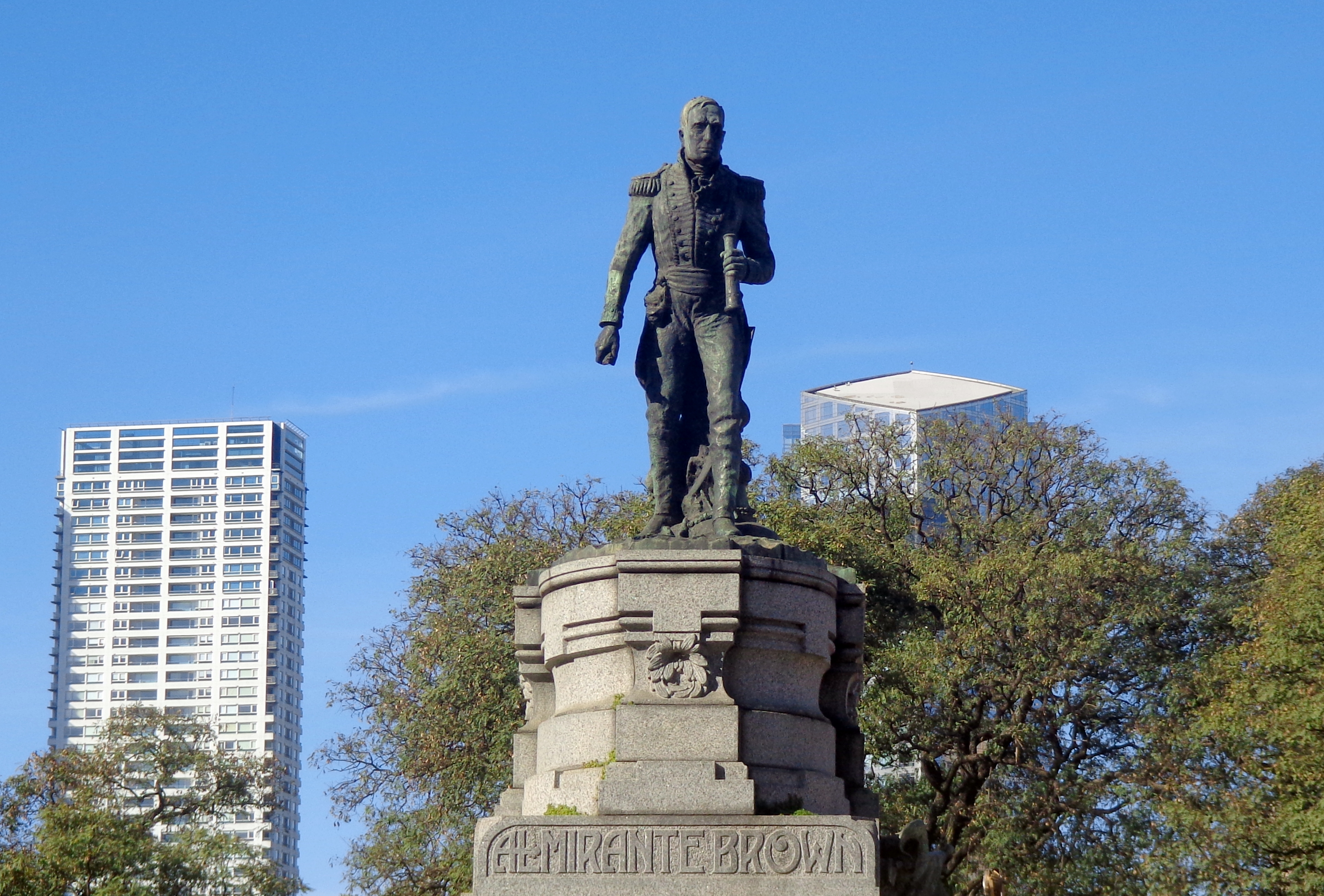 Monumento a Guillermo Brown, obra de Alejandro Chiapasco.